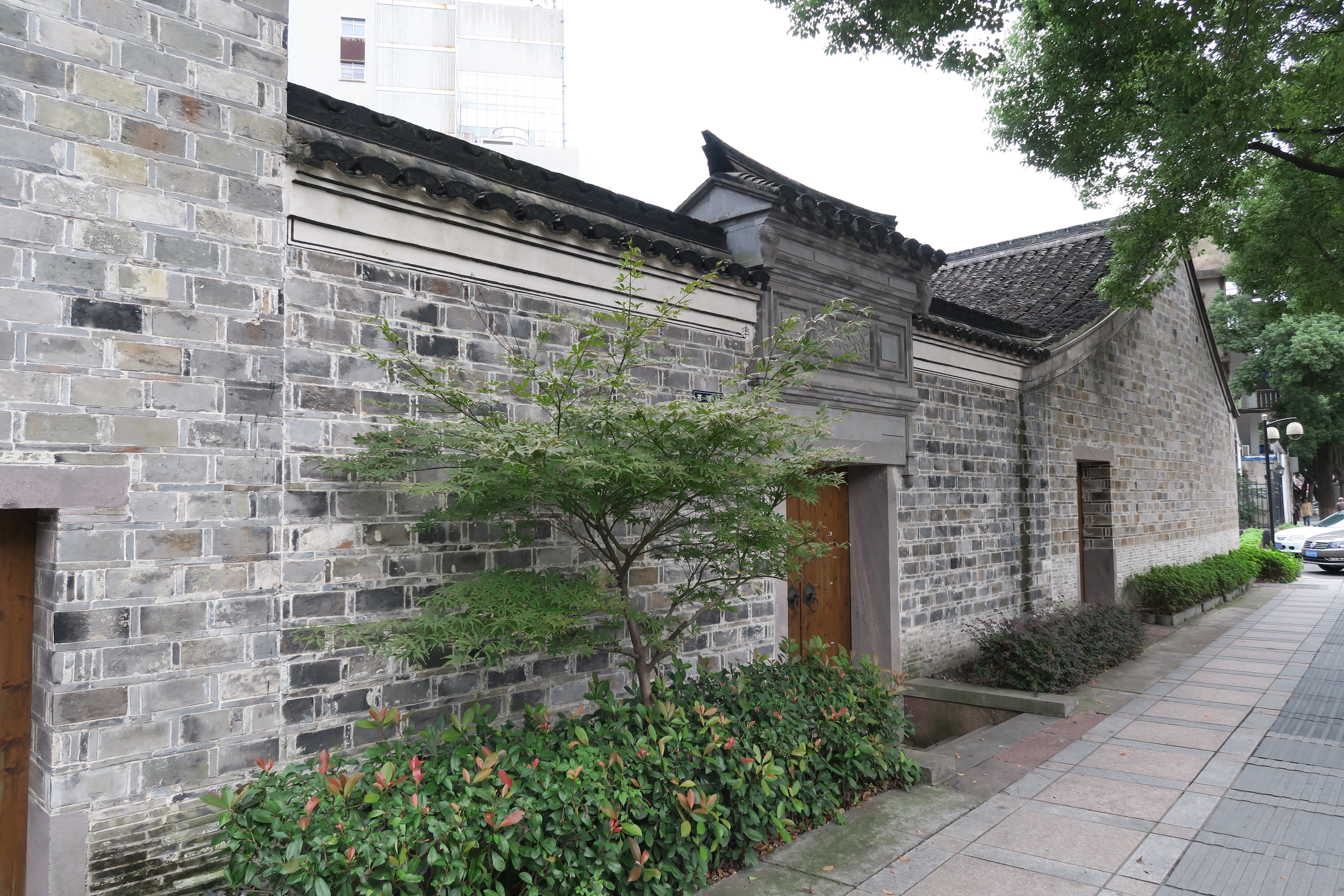 姚庆三故居